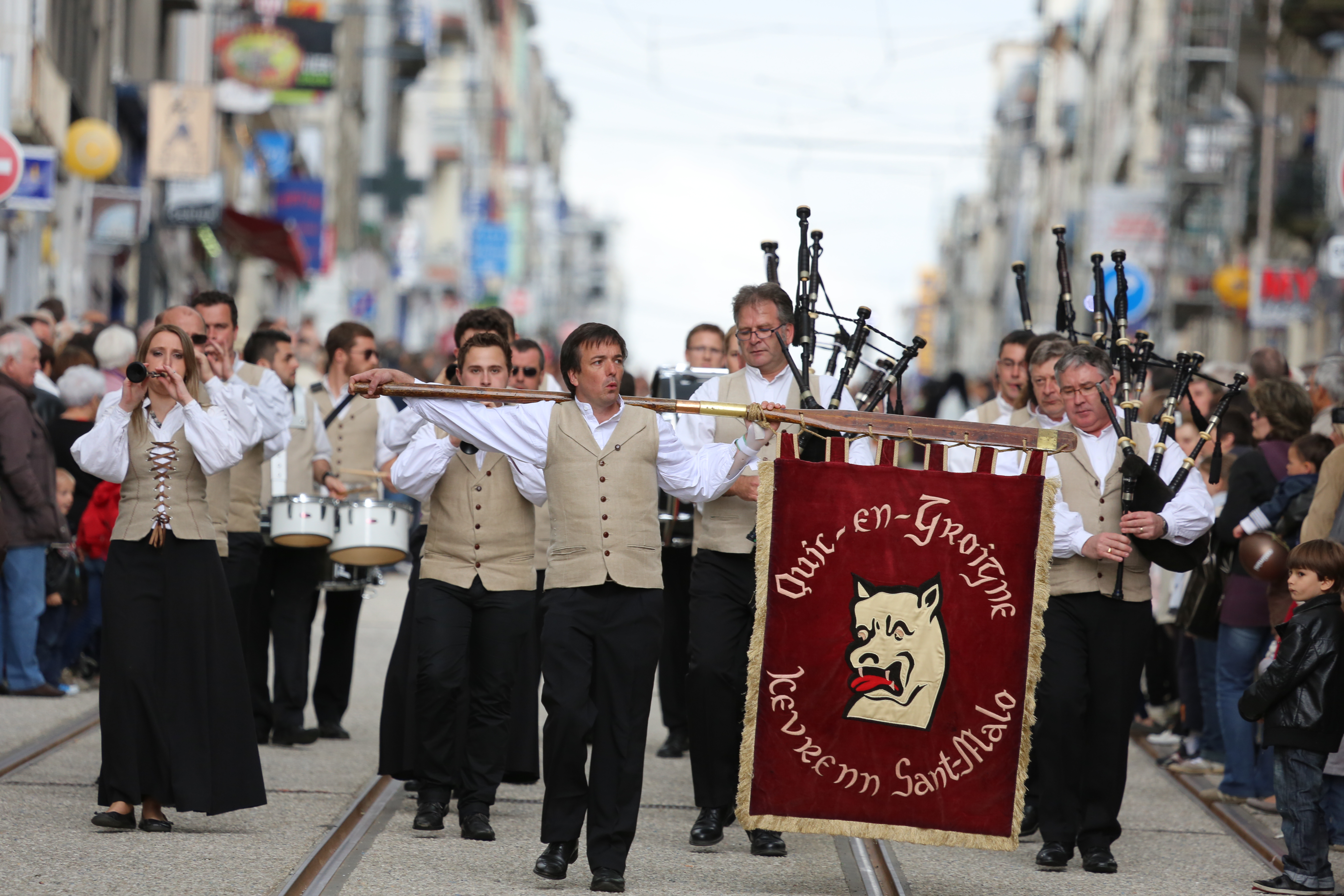 Photo de la parade du printemps des sonneurs le 19 mai 2012 à Brest